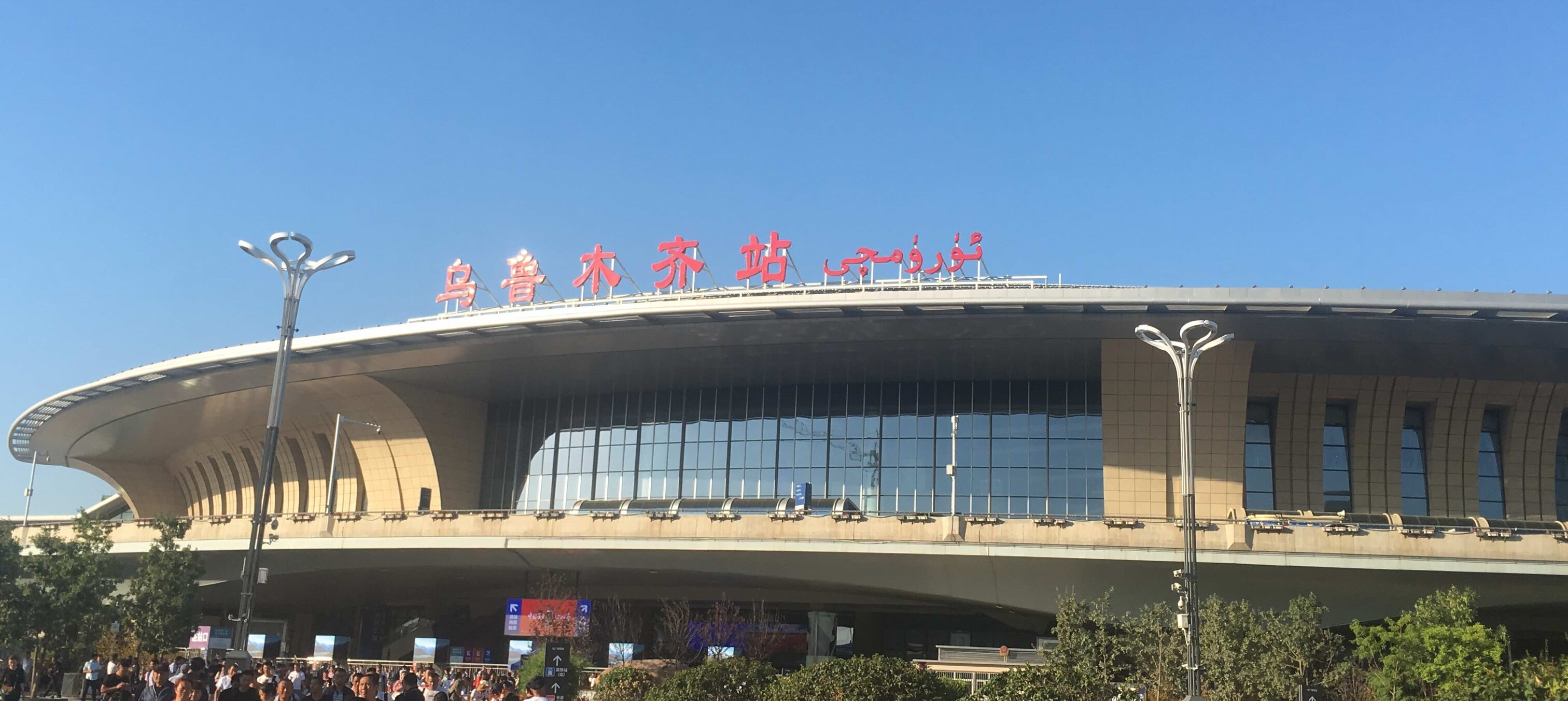 乌鲁木齐新客站